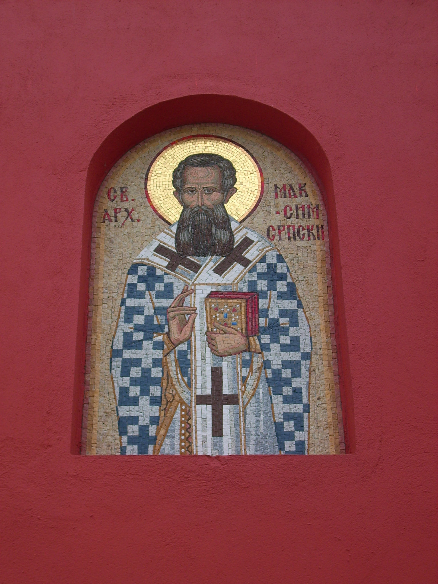 Манастир Крушедол; манастир Српске православне цркве на јужној страни Фрушке горе у Војводини.